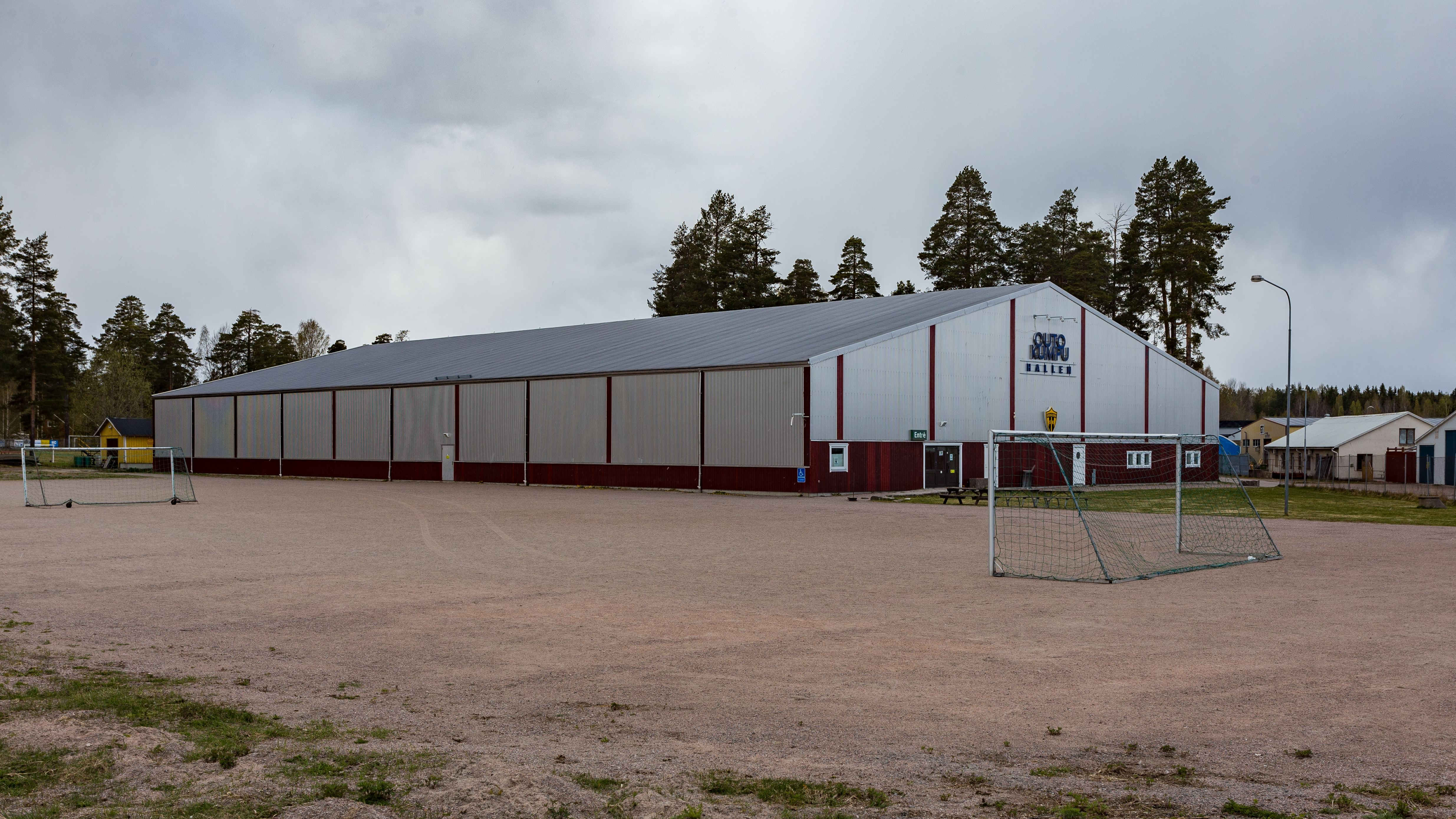 Outokumpu-hallen, Skogsbo, Avesta, Dalarnas län, Sverige.